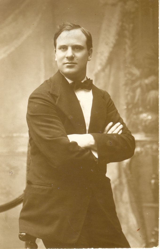 L'artista Gennaro Fantastico all'età di 33 anni. Gennaro Fantastico (Salice Salentino, 1881 – Salice Salentino, 1958) è stato un pittore e cantante italiano.